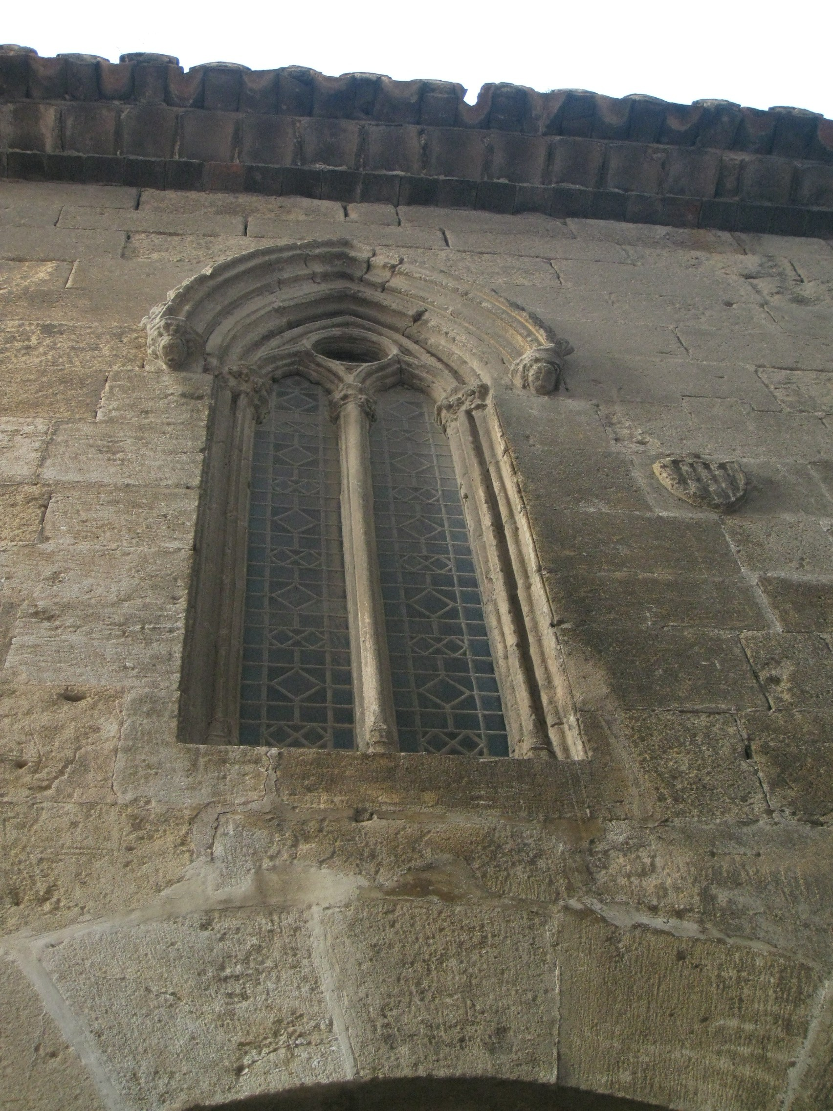 Església de Sant Julià (l'Arboç)